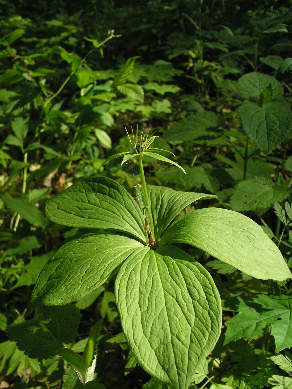 Хмільницька Дача, Хмільницький р-н, Хмільницьке л-во, кв. 29